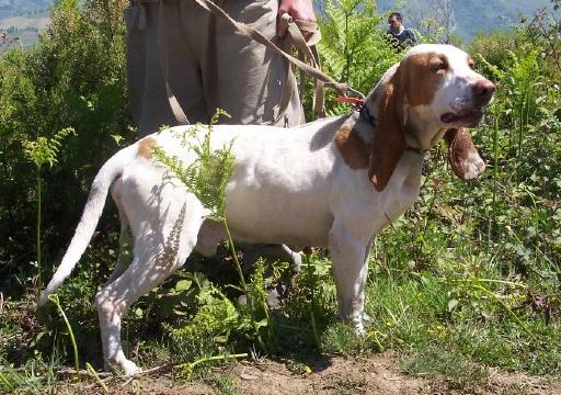 Sabueso en Cangas de Narcea, Asturias.